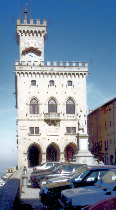 מושה הפרלמנט